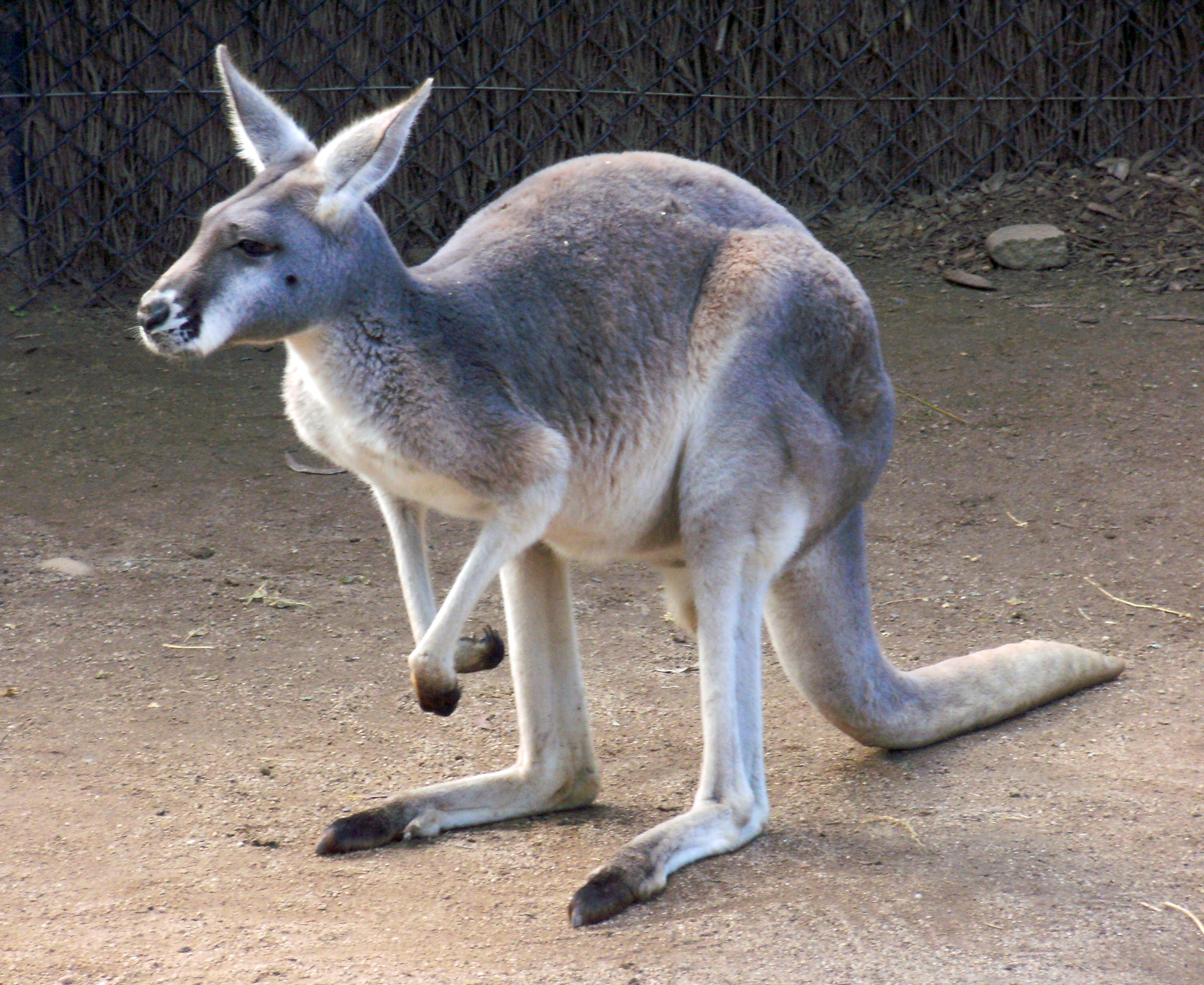 Roo